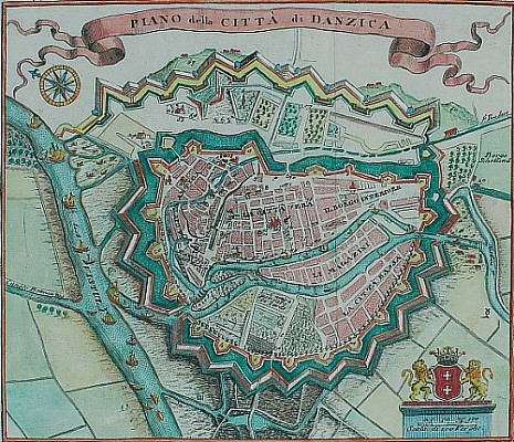 GDAŃSK Piano della Città di Danzica. XVIII w. Miedzioryt kolorowany 16x19 cm [ramka], opr. 30x32 cm Schwarz [Z I 18] wymienia plan o identycznym tyt. jako kopię planu Bodenehra i dat. go na ok. 1740. Nad górna ramką [l. g.] : Vol. 7. Pag. 318. [u Schwarza : Vol. 7. Pag. 336]. Plan Gdańska i okolicy z lotu ptaka z wyeksponowanymi murami obronnymi i umocnieniami. Zob. ilustr. s. 13.